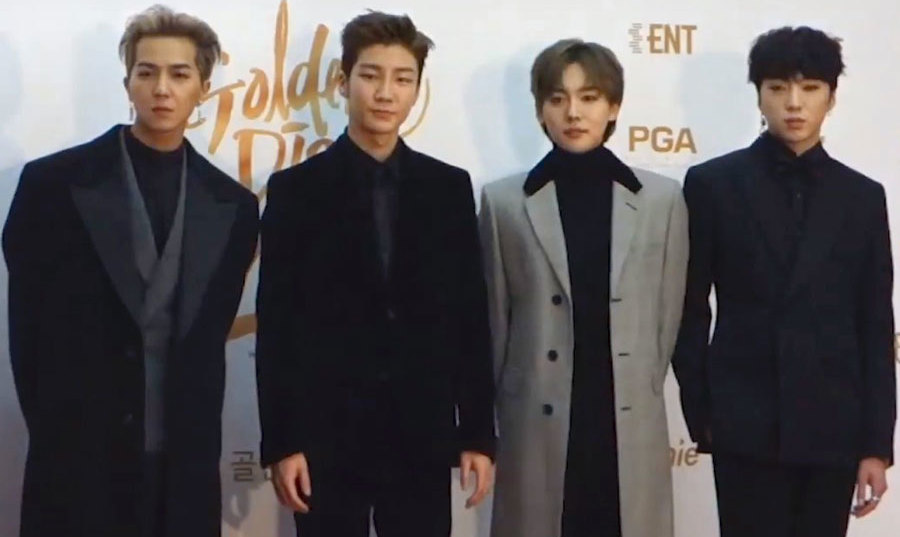 180110 제 32회 골든디스크